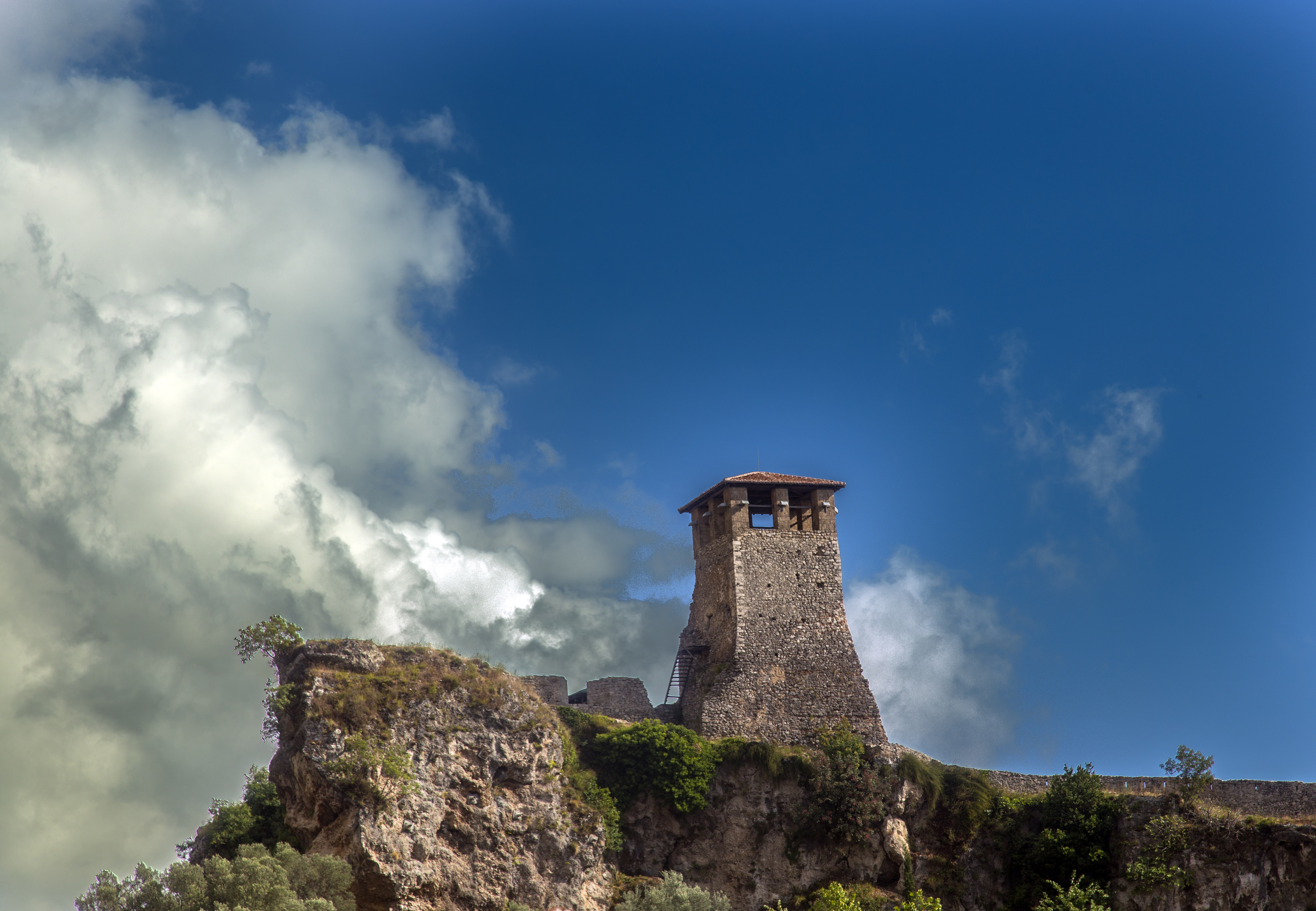 Kalaja e Krujes